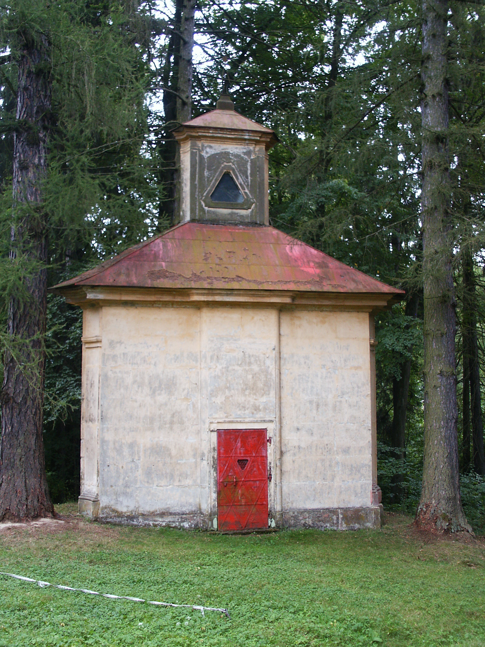 Kaple Nejsvětější Trojice, Z od Ostružna při cestě ke Štidlům, Ohařice - podhled z louky